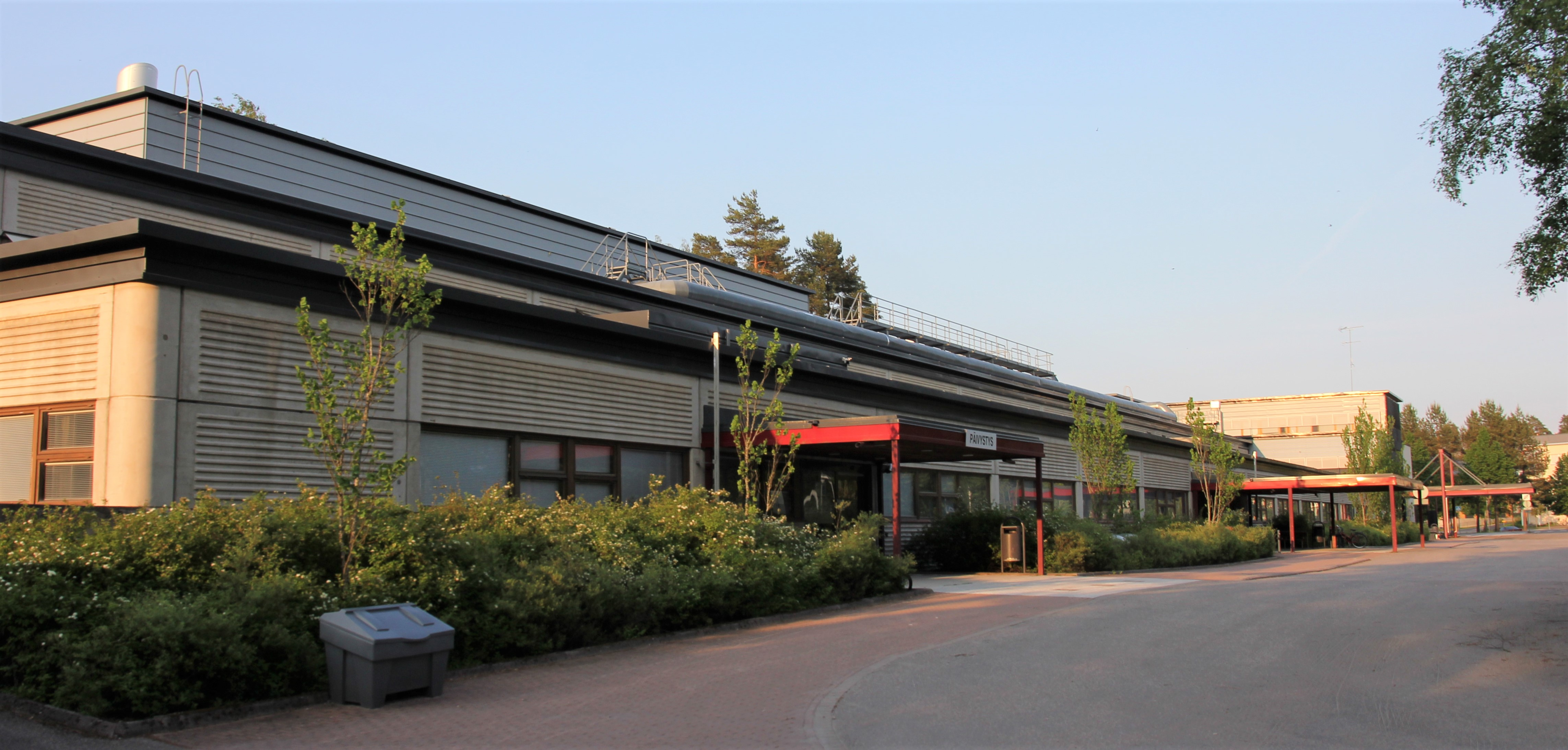 Keravan terveyskeskus antaa julkisen palvelun terveyspalveluja Keravalla, Kalevan kaupunginosassa. Kuvassa rakennuksen länsipäätä, jossa sijaitsee terveyskeskuspäivystyksen sisäänkäynti. Terveyskeskuksen osoite on Metsolantie 2, Kerava.